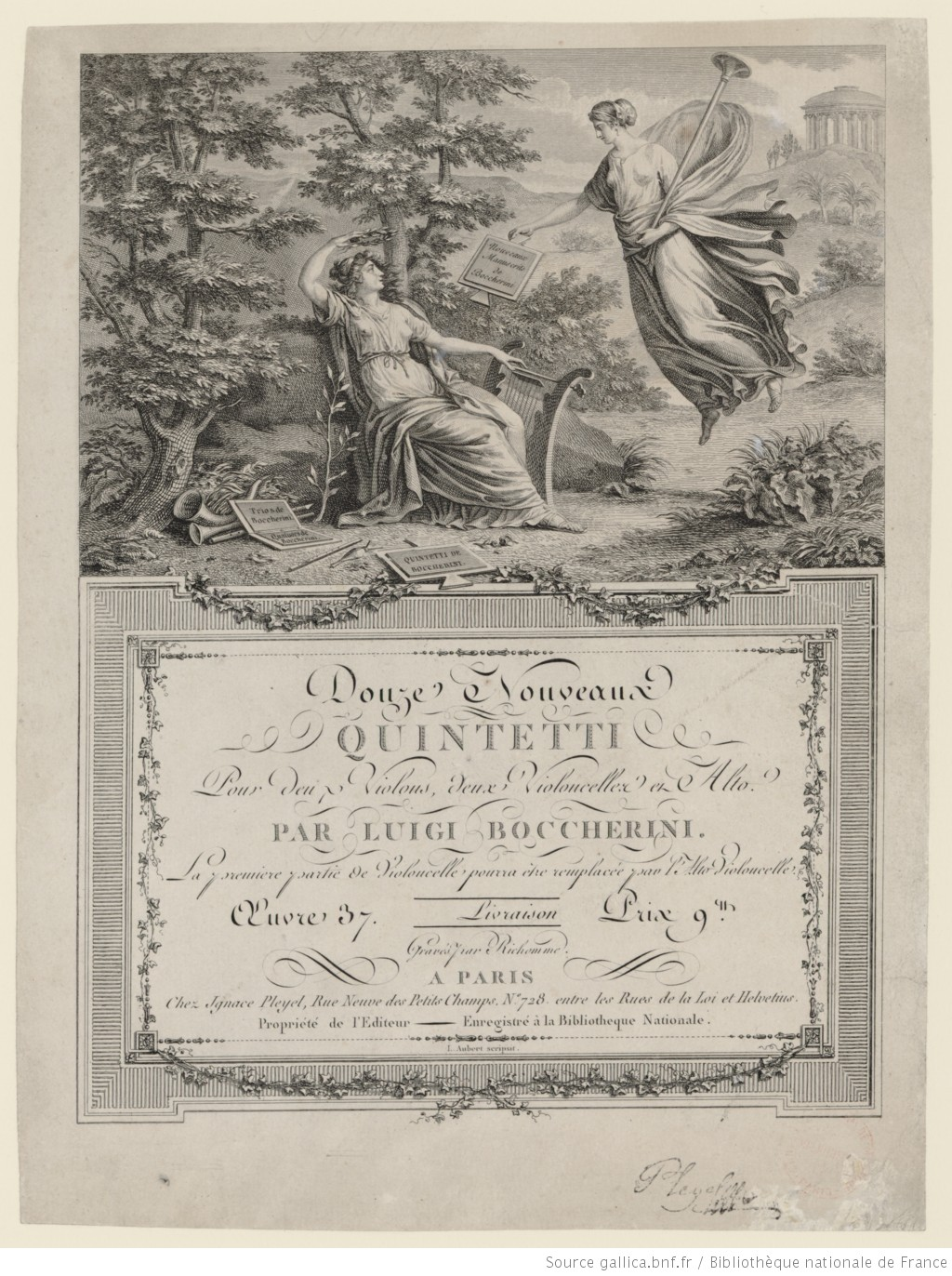 Page-titre du recueil de douze quintettes (arbitrairement réarrangés) publié comme Œuvre 37 par Ignace Pleyel entre 1798 et 1812 .